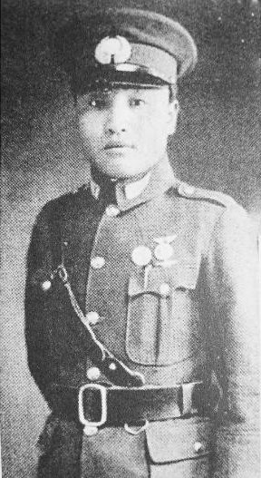 中國空軍李桂丹